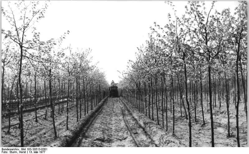 Berlin, Blick in eine Baumschule Zum Beitrag: Eine grüne Quelle für gute Berliner Luft - Zwischen Rosencontainern, Zier- und Nadelgehölzen in Baumschulenweg ADN-ZB Sturm 13.5.1977-ha. Jährlich werden hir in der Berliner Baumschule im Ortsteil Späthsfelde etwa 10.000 Starkbäume für die umfangreichen Grün- und Parkanlagen der Hauptstadt herangezogen. Der Betrieb ist dem VEG Saatzucht Baumschulen Dresden angeschlossen und trägt in bedeutendem Maße dazu bei, daß die grünen Oasen der Hauptstadt ständig mit Nachschub versorgt wrden können. (Bitte beachten Sie hierzu auch S 0513-300 + 302 N - Ferner kann das Farbmotiv S 0510-406 N bei ZB angefordert werden)